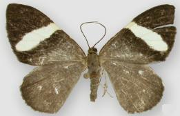 Hagnagora unnia